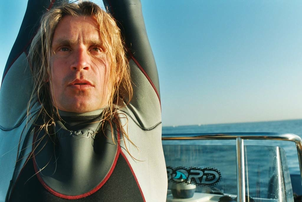 Loïc Leferme recordman, du monde apnée No-Limit